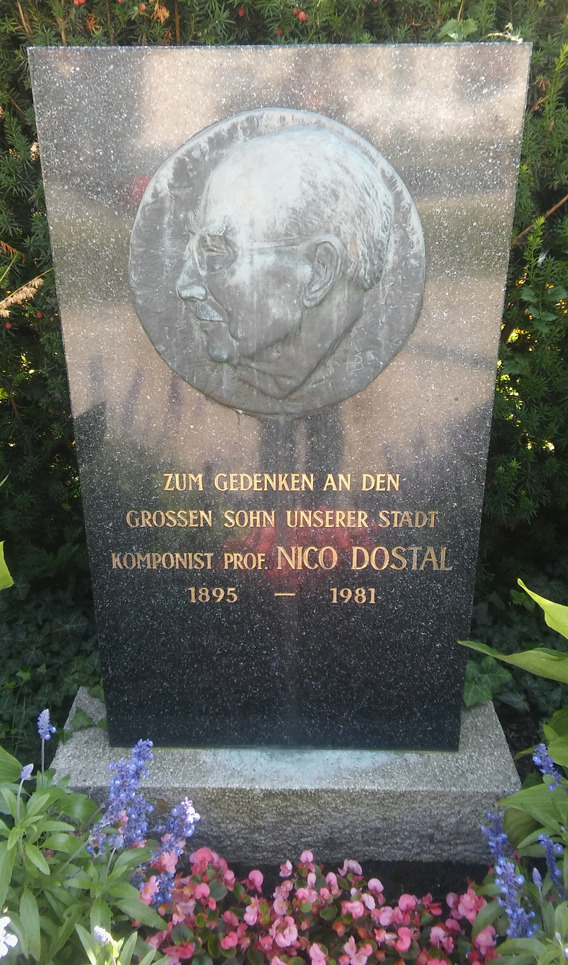 Gedenkstein für Nico Dostal